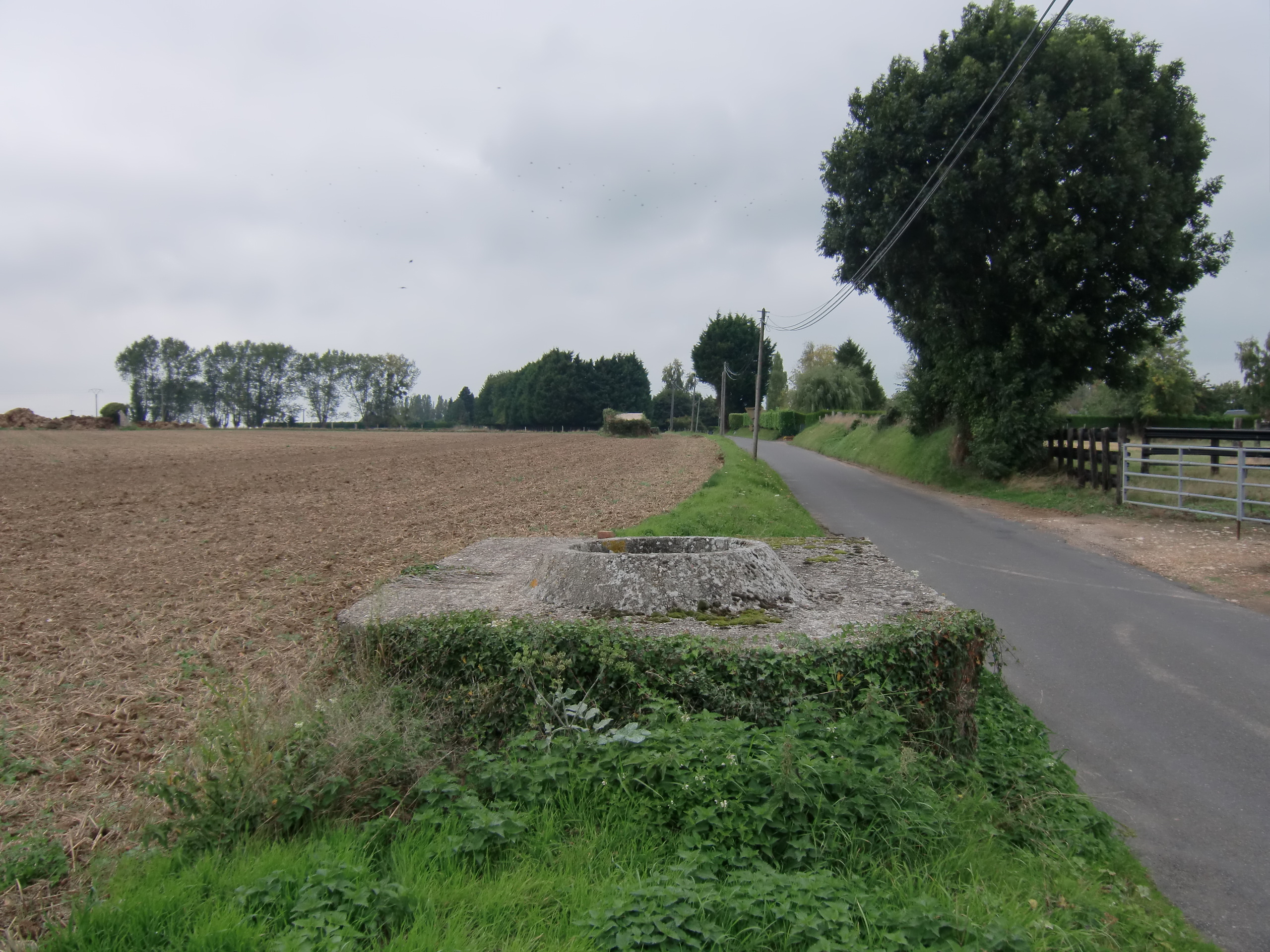 Vestige de bunker allemand ("Tobrouk") près de Pont-Audemer